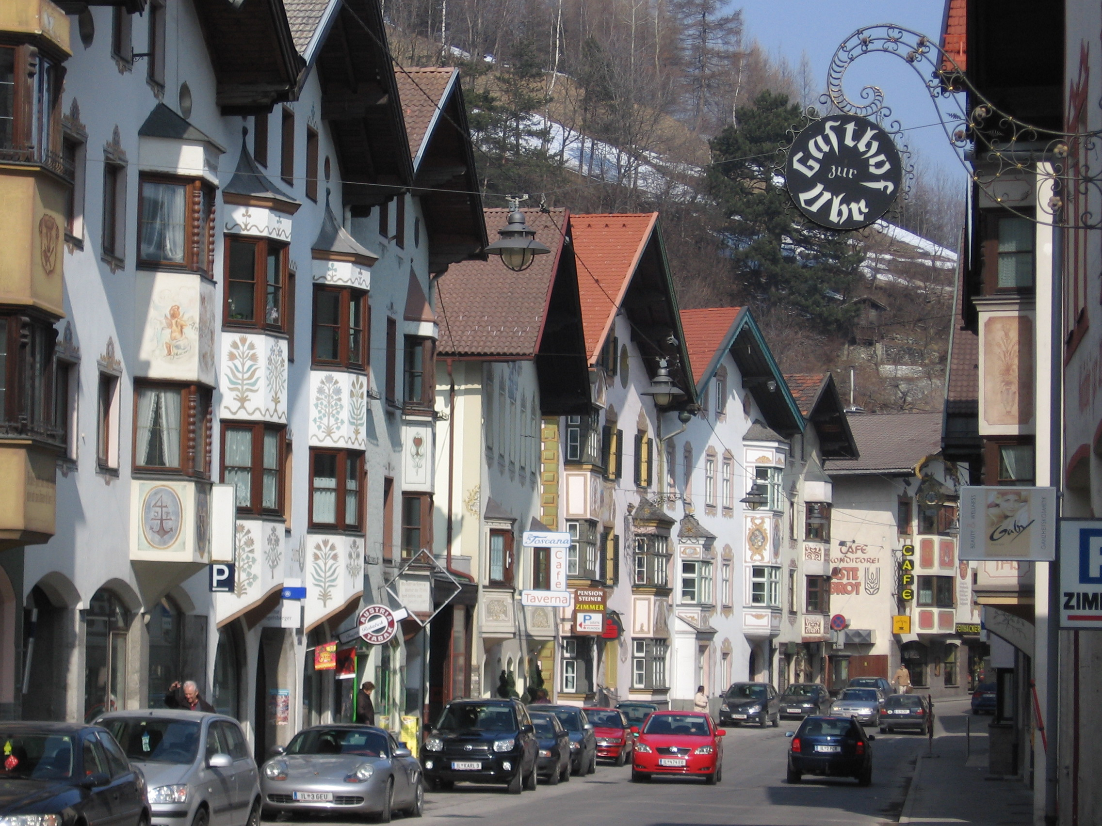 Hauptstrasse Matrei am Brenner).